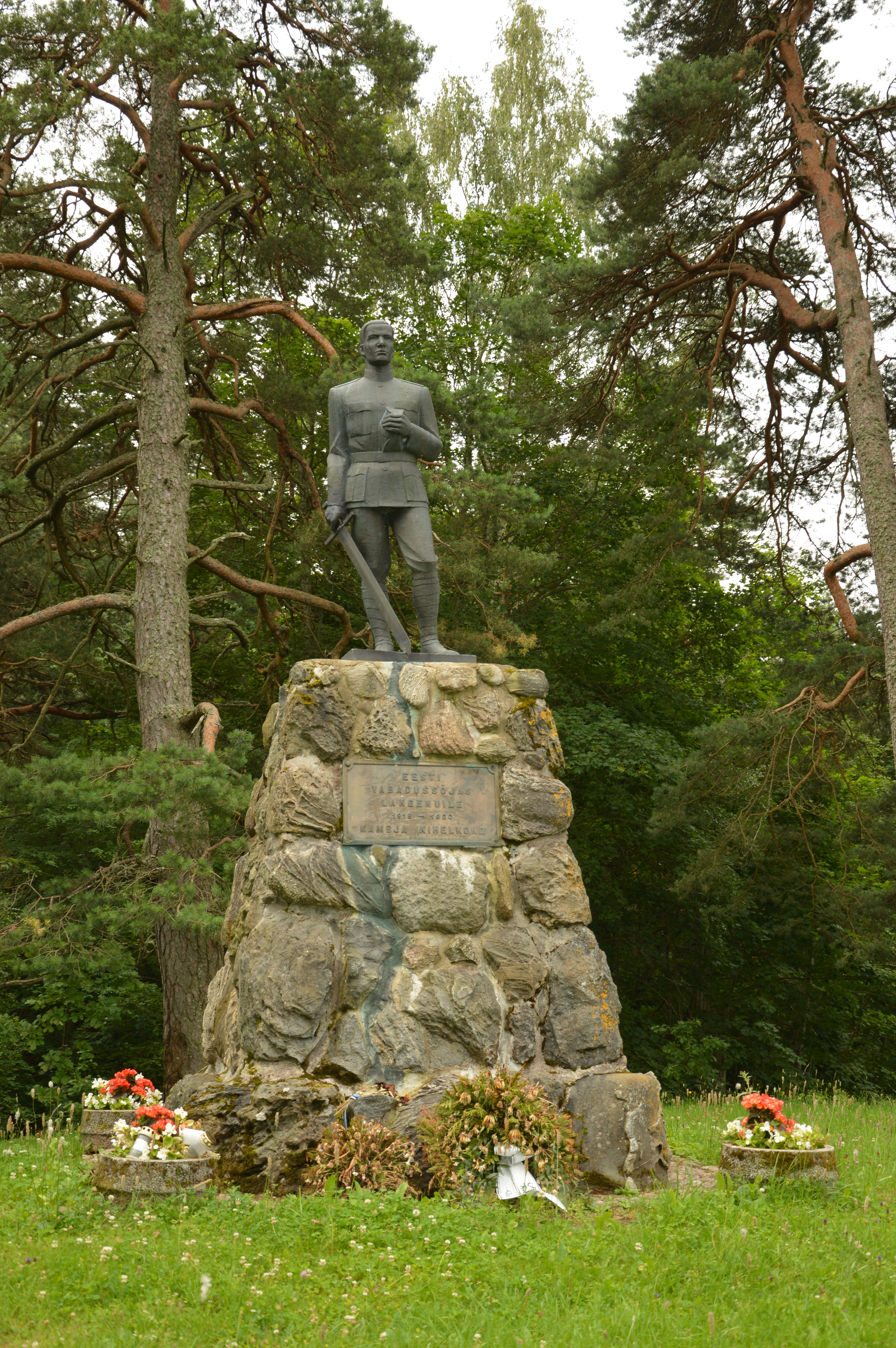 Vabadussõja mälestussammas Kambjas